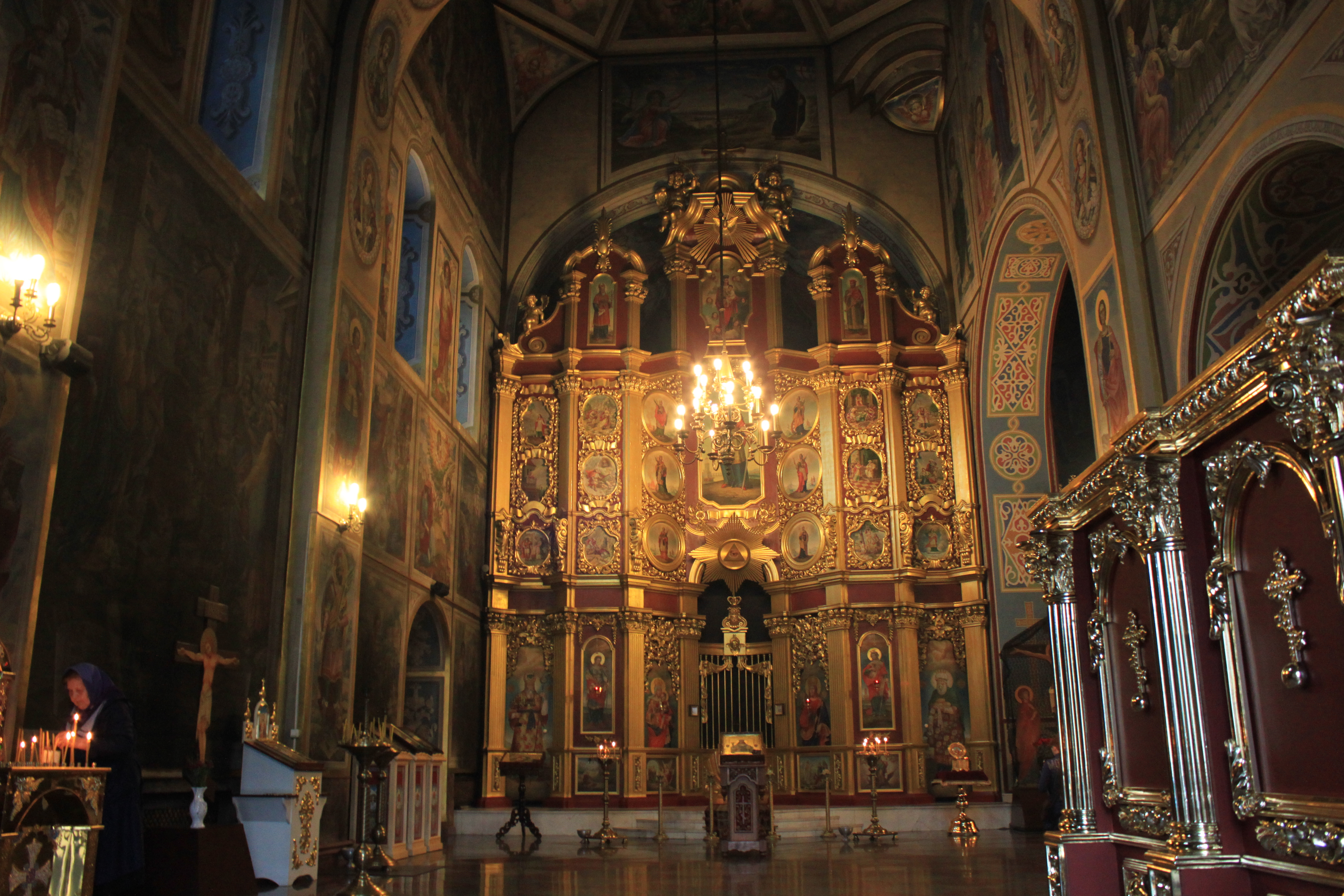 Innenansicht St.-Andreas-Kirche in Kiew